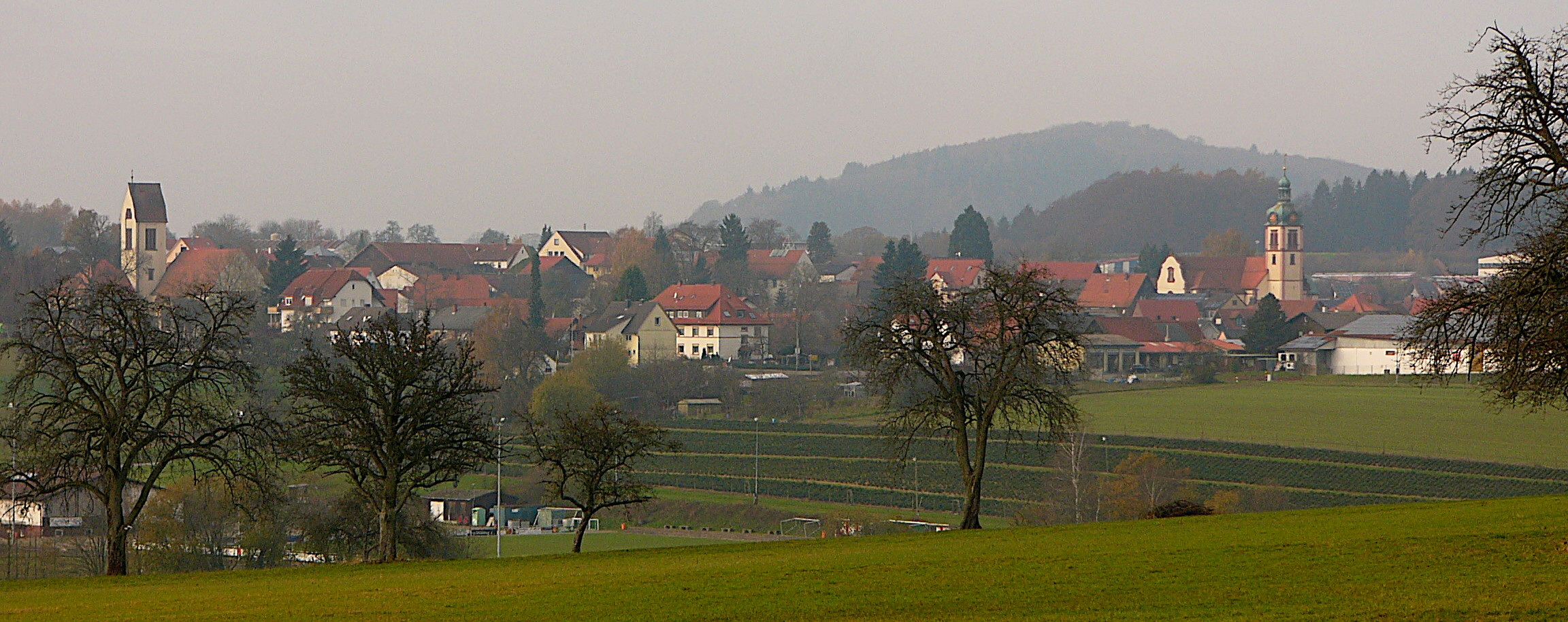 Blick über Strümpfelbrunn.